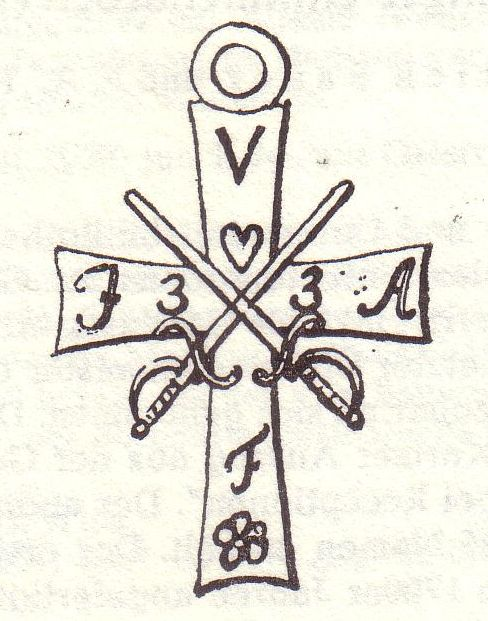 Ordenskreuz des Göttinger Unitistenordens (1786-1799)